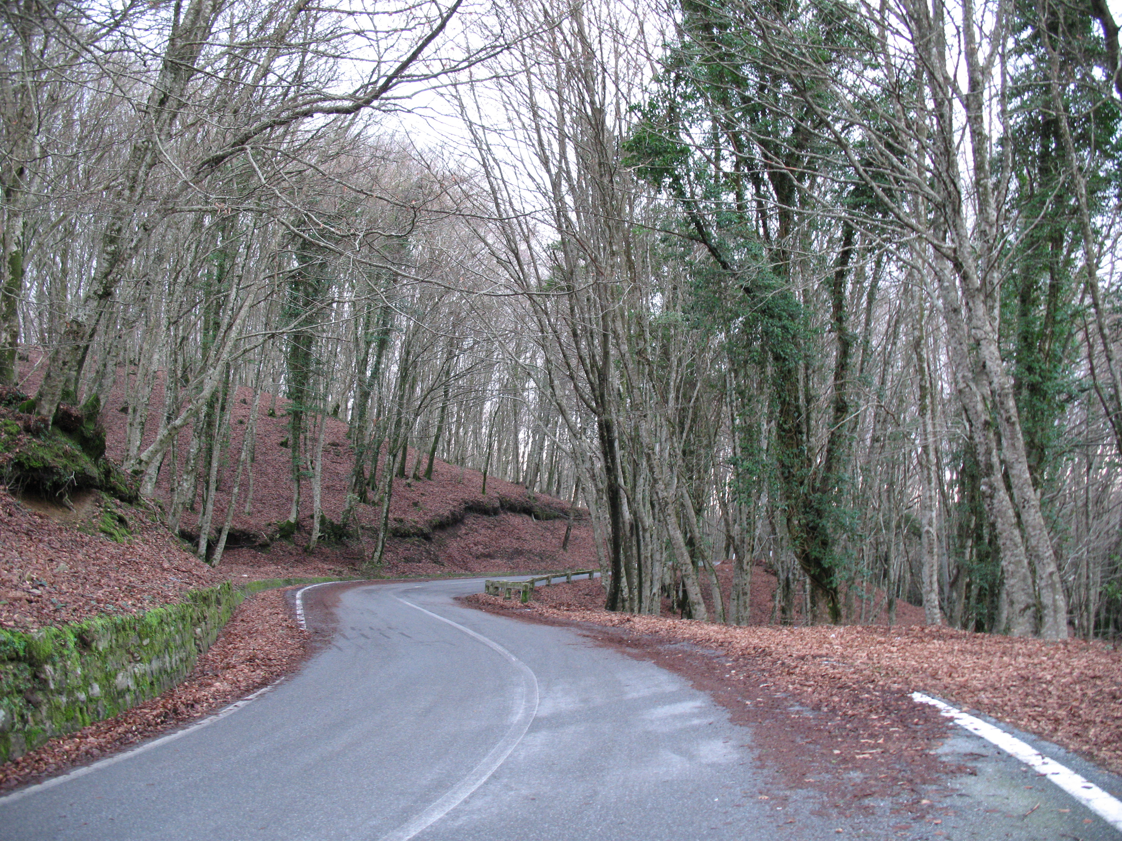 Strada Provinciale 1 di Gioia Tauro e Locri, Piani di Zomaro